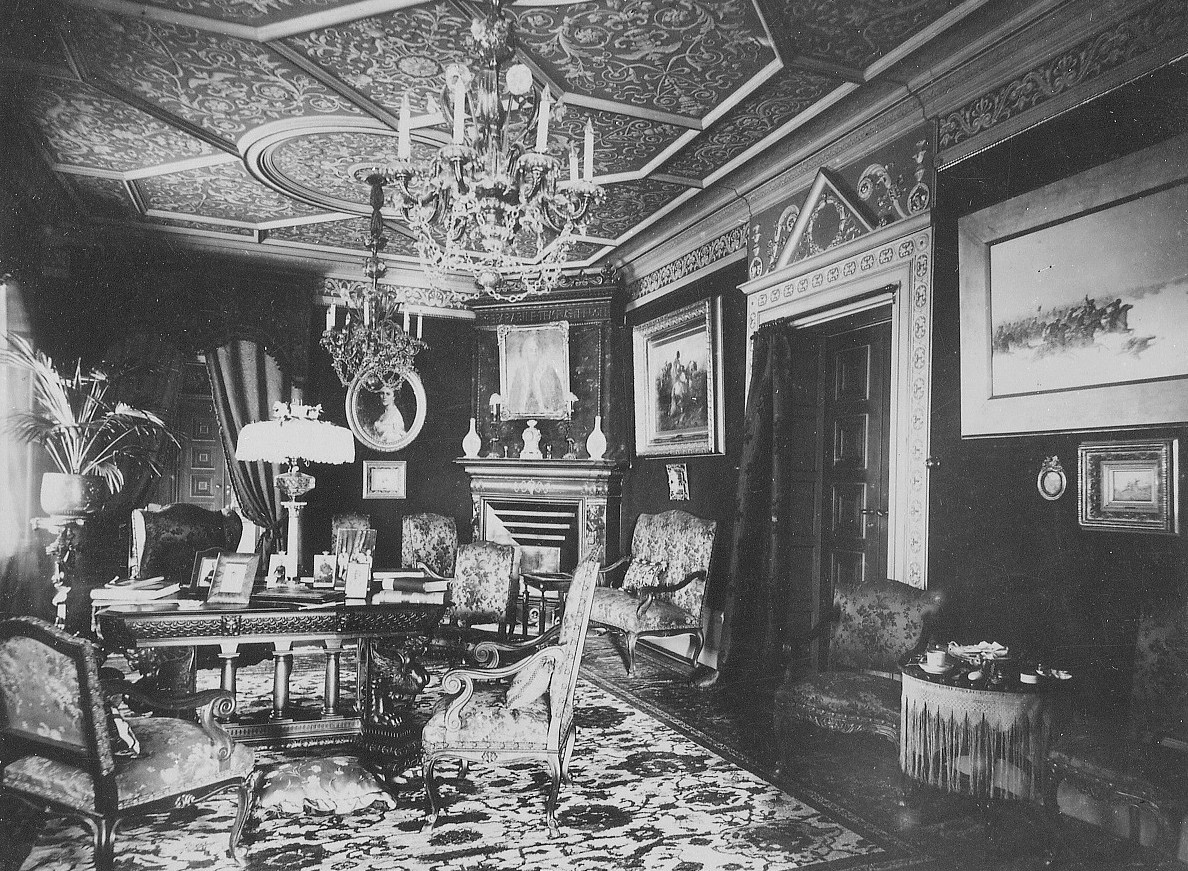 Salongen i generalen, greve Reinhold von Rosens hem, Strandvägen 29, 4 tr. På Samfundet S:t Eriks kulturhusskylt om Bünsowska huset: "Uppfördes 1886-88 av trämagnaten F Bünsow. För planritningar anlitades arkitekt A G Forsberg. För fasaderna utlystes Sveriges första arkitekttävling i privat regi. Vinnare blev Isak Gustaf Clason. Han arbetade här med fri fönstergruppering och äkta material i stället för puts och stuck. Huset hade redan från början badrum, vattenklosetter, hissar och elektrisk belysning."